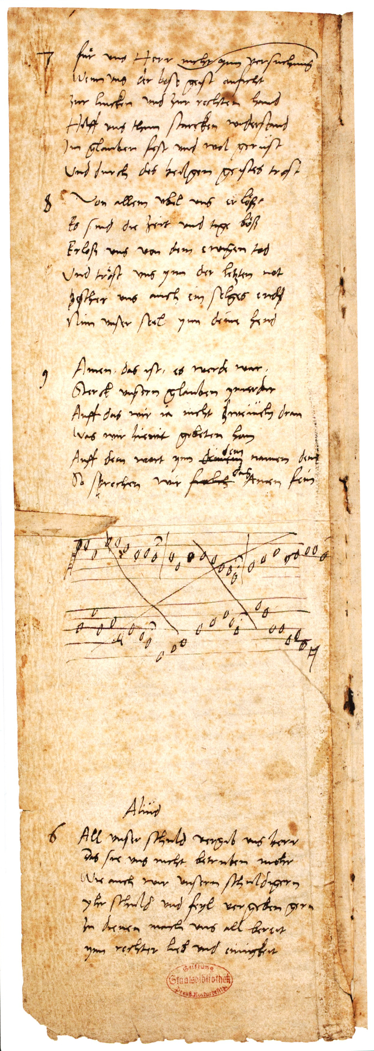 Autograph Martin Luthers, Das Vaterunser-Lied. Einer von wenigen Chorälen von Martin Luther. Auf der zweiten Seite ist die einzige, bekannte Notenschrift von Martin Luther. Von ihm selbst wieder verworfen.